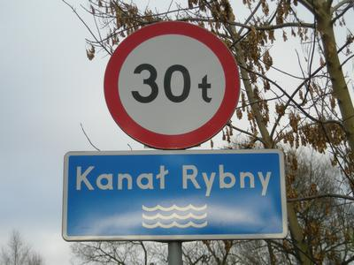 Kanał Rybny, Szczecin